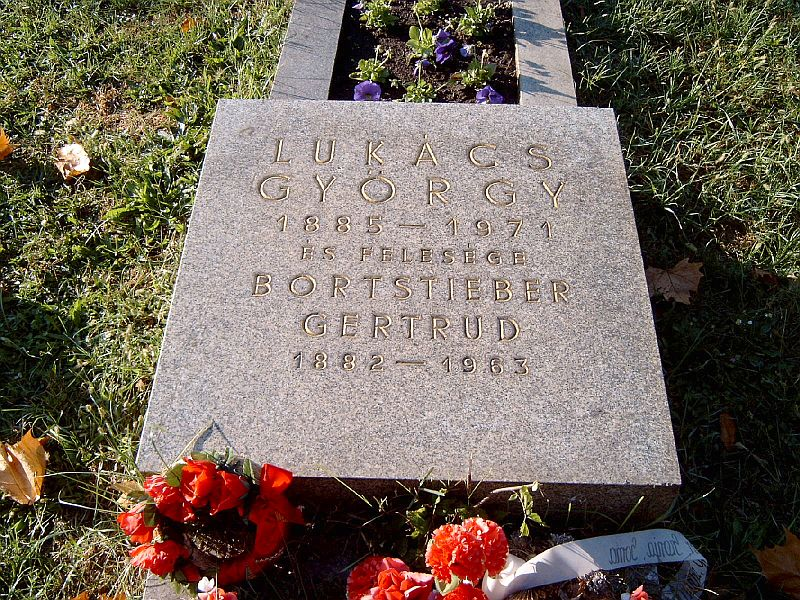 Lukács György sírja Budapesten. Kerepesi temető: Mm. J. 13.